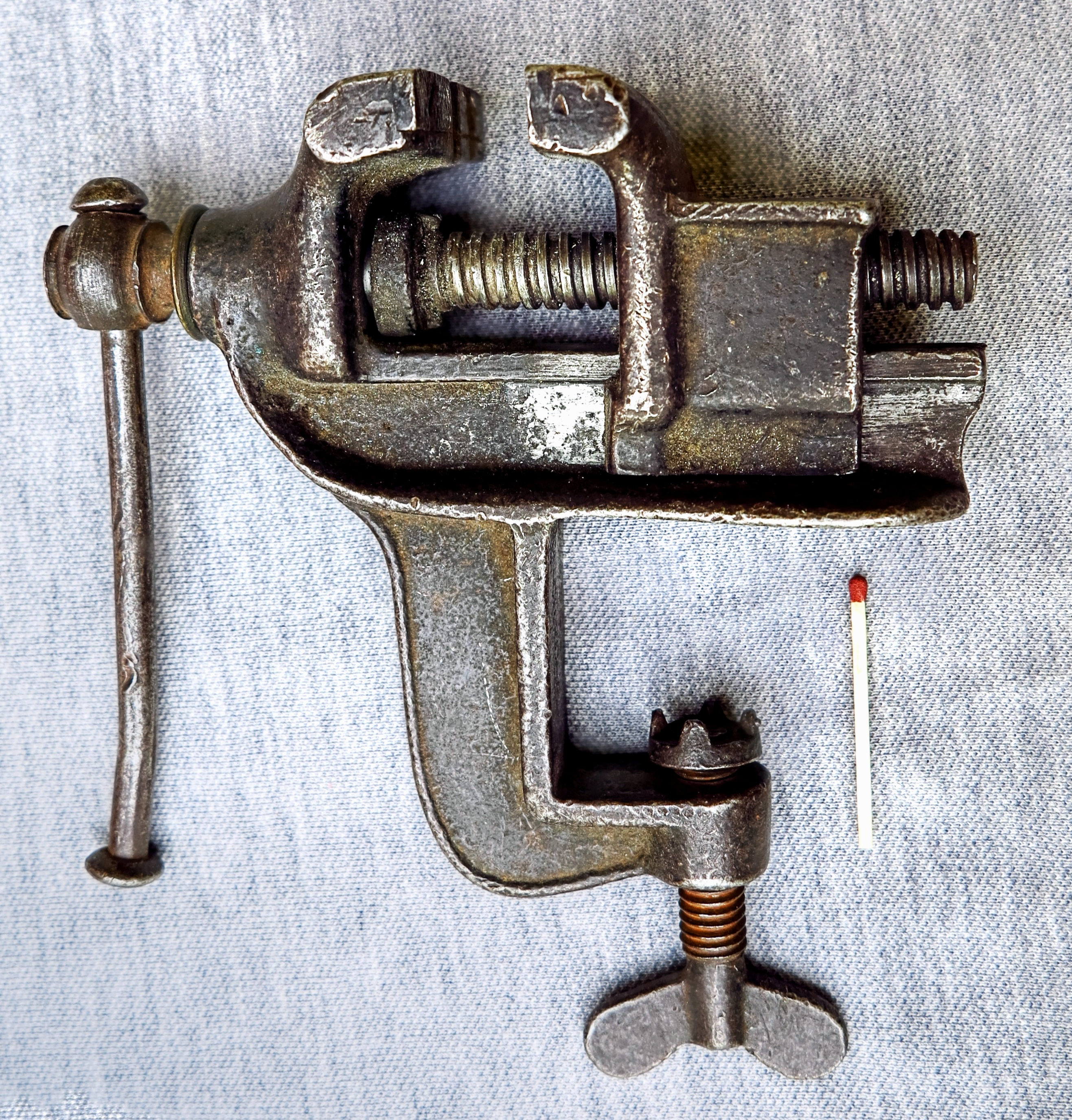 Parallelschraubstock mit Schraubzwingenbefestigung, Backenbreite ca. 45 mm, maximale Spannweite ca. 55 mm, Gusseisen, ca. 1920, HDR-Aufnahme